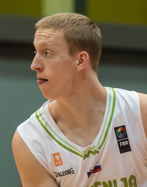 ÖBV Vier-Nationen-Turnier vom 12.-14. August 2016 in Schwechat: Slowenien vs Polen. Bild zeigt Miha Lapornik (SLO).